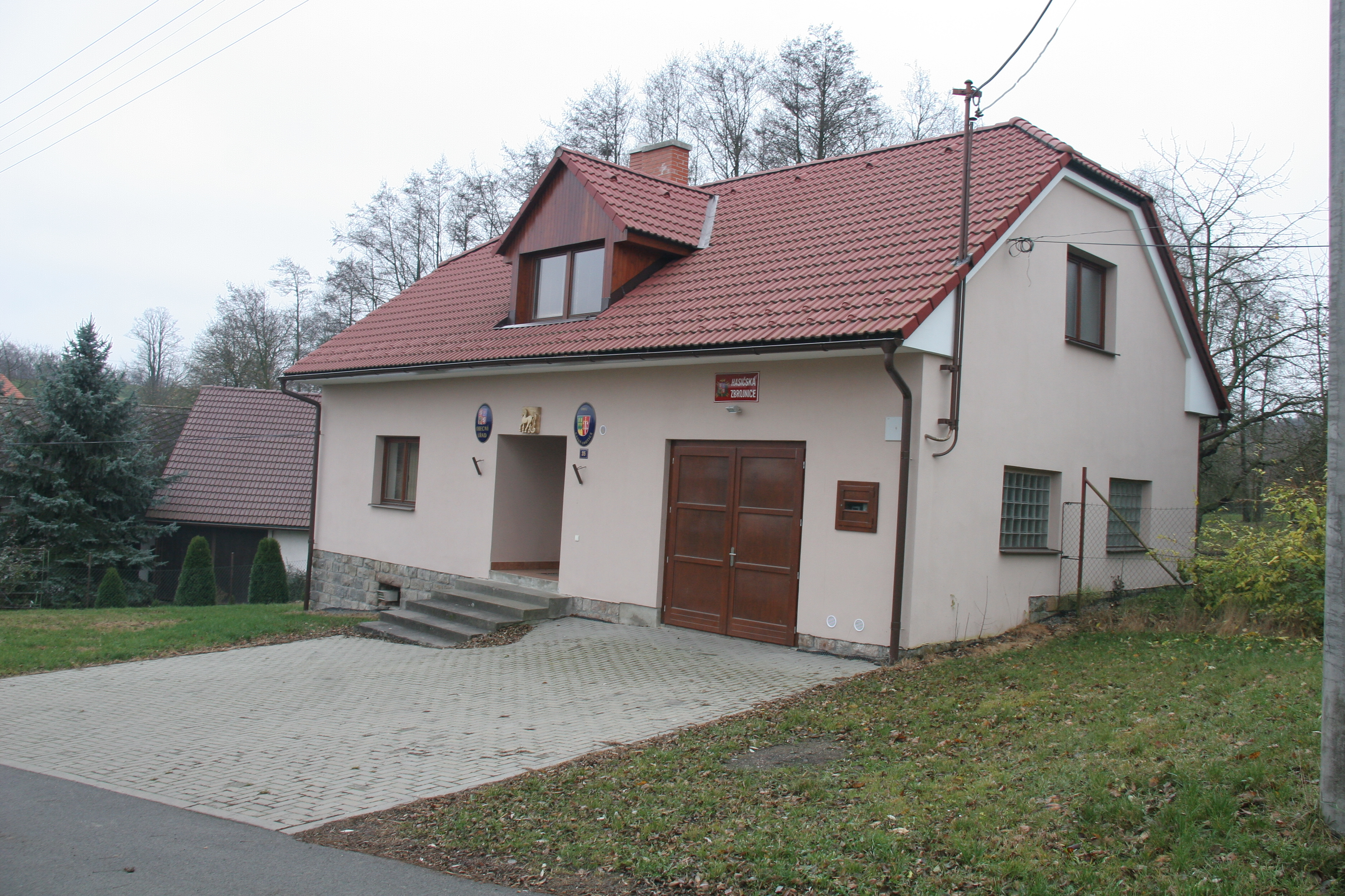 České Lhotice obecní úřad